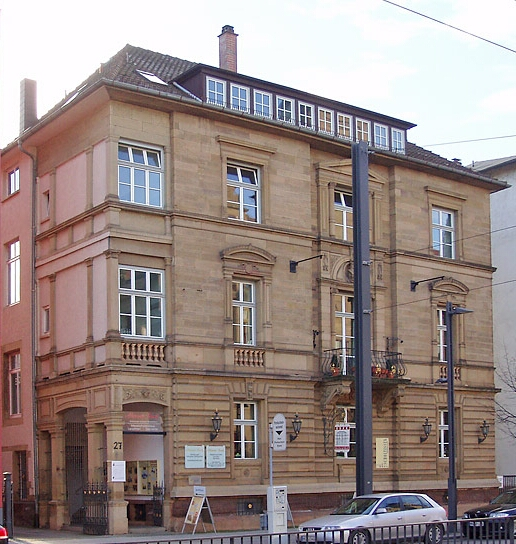 Ausschnitt aus unten genannter Quelle